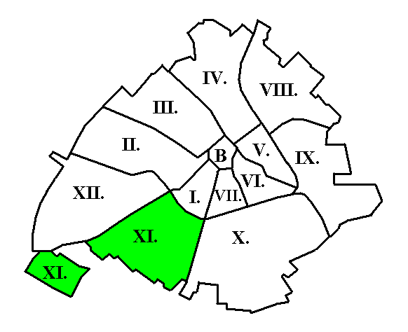 Kecskemét XI. kerülete a térképen